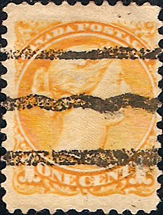 Timbre préoblitéré du Canada, Victoria style T